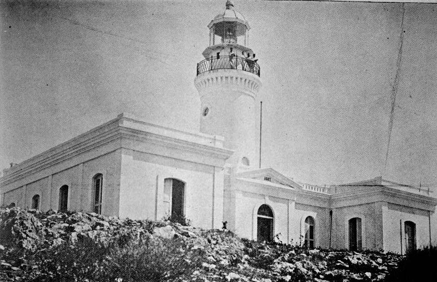 Faro de La Isla Caja de Muertos, Isla Caja de Muertos, Ponce, PR.